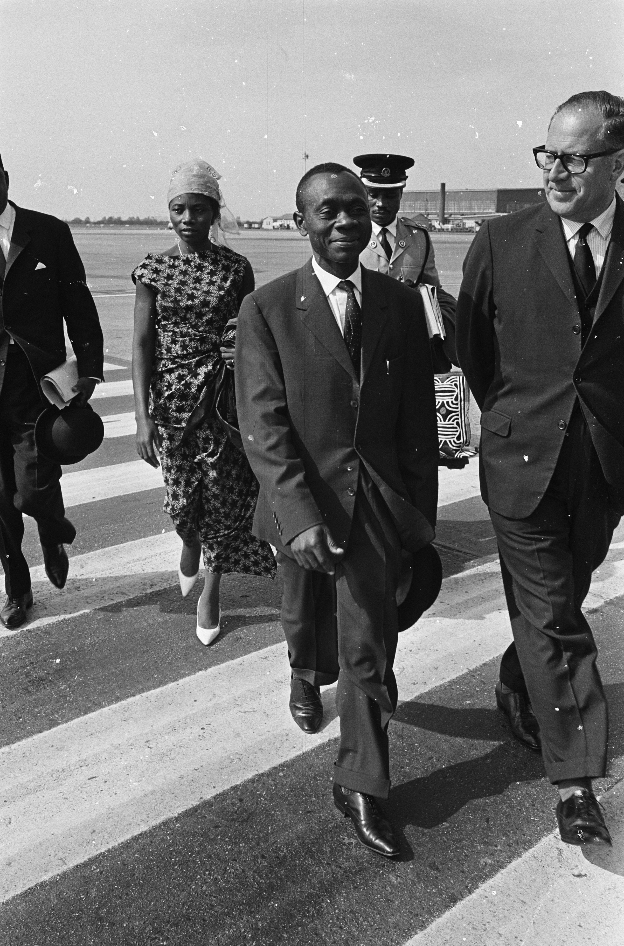 Collectie / Archief : Fotocollectie Anefo Reportage / Serie : [ onbekend ] Beschrijving : Aankomst van vice president van Kameroen J. Foncha op Schiphol, links achter zijn echtgenote rechts de heer Ngu Datum : 19 mei 1964 Locatie : Noord-Holland, Schiphol Trefwoorden : ECHTGENOTES, aankomsten, vice-presidenten Persoonsnaam : J. Foncha Fotograaf : Pot, Harry / Anefo Auteursrechthebbende : Nationaal Archief Materiaalsoort : Negatief (zwart/wit) Nummer archiefinventaris : bekijk toegang 2.24.01.05 Bestanddeelnummer : 916-4472